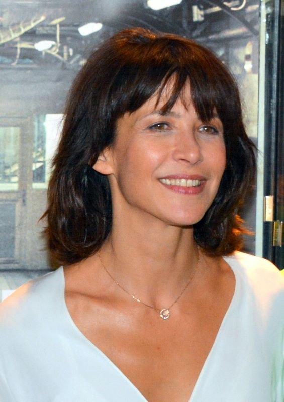 Sophie Marceau à une avant-première du film "La Taularde"